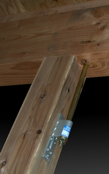 ホールダウン金物_ビス留め式_15kN用_02